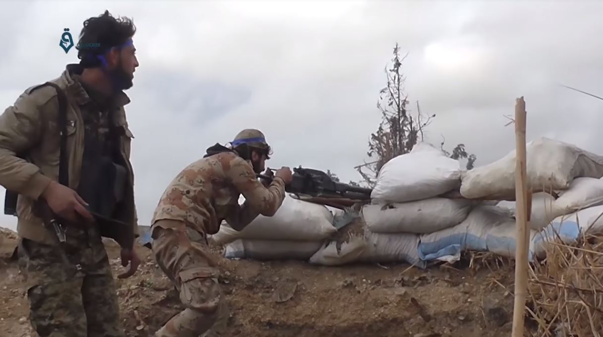 Rebelles de Jaych al-Islam à Qasmya, dans la Ghouta orientale, le 30 janvier 2017, lors de la guerre civile syrienne.